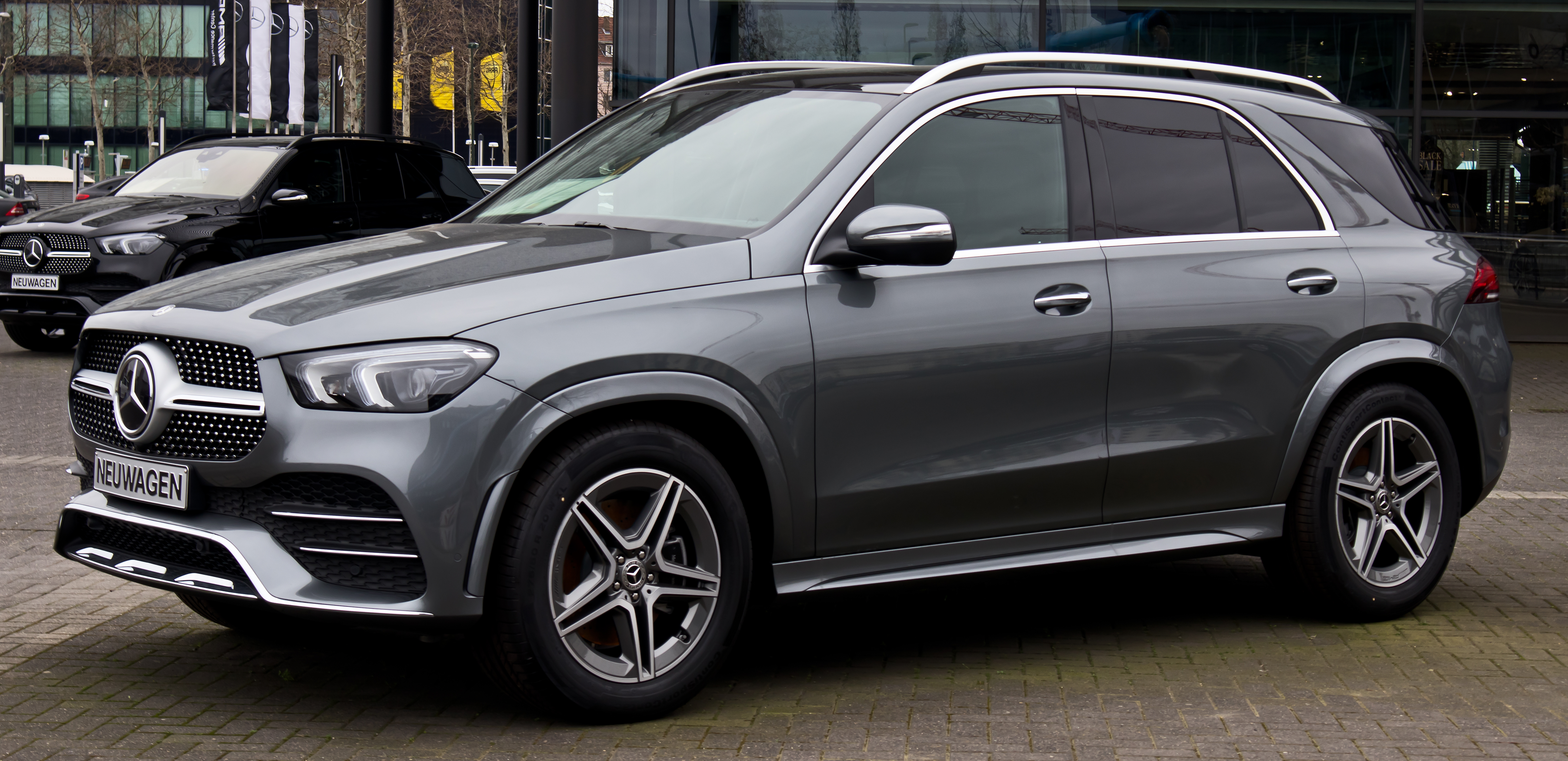 Mercedes-Benz GLE 350 d 4MATIC AMG Line (V 167)